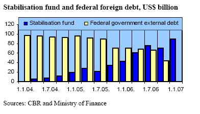 Russian_fund_debt2007